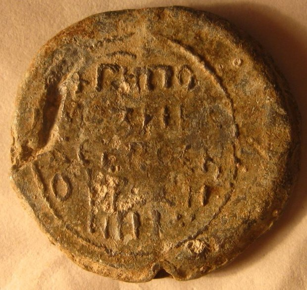 Надпіс на пячаці Ефрасінні Полацкай, знойдзенай у Полацку пры раскопках на тэрыторыі Спаса-Ефрасіннеўскага манастыра.